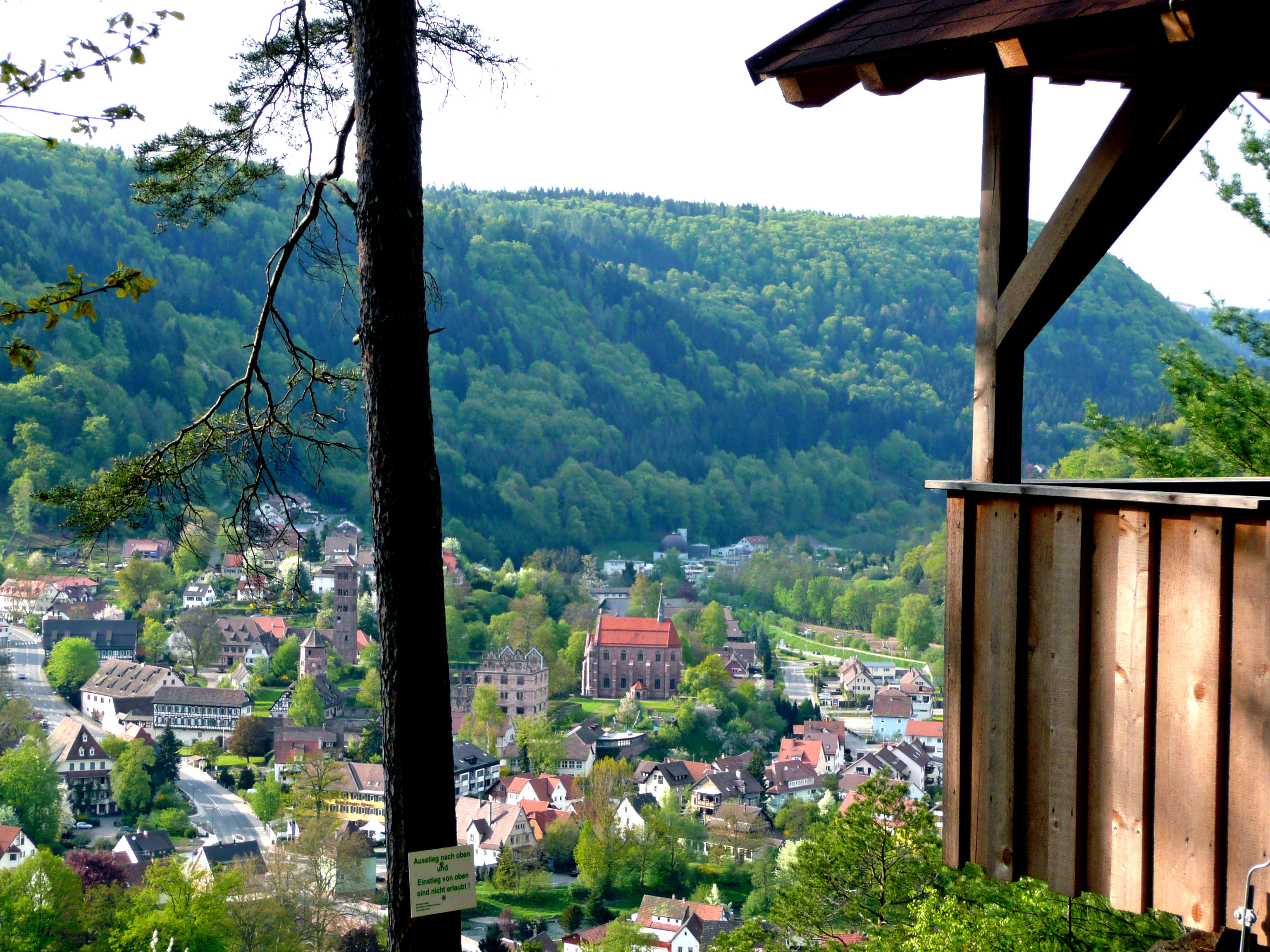 Aussichtspunkt Welzberghütte: Blick auf Calw-Hirsau, u. a. auf das Benediktinerkloster St. Peter und Paul